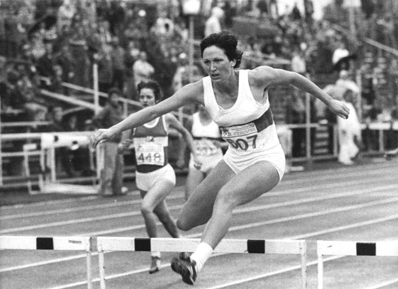 Bärbel Klepp, Petra Pfaff ADN-ZB Thieme Tele-11.8.79 Karl-Marx-Stadt: 30. DDR-Meisterschaften in der Leichtathletik- In 55,92 s gewann die 21jährige Magdeburgerin Bärbel Klepp (vorn) am 10.8. den Endlauf über 400 m Hürden vor Petra Pfaff.